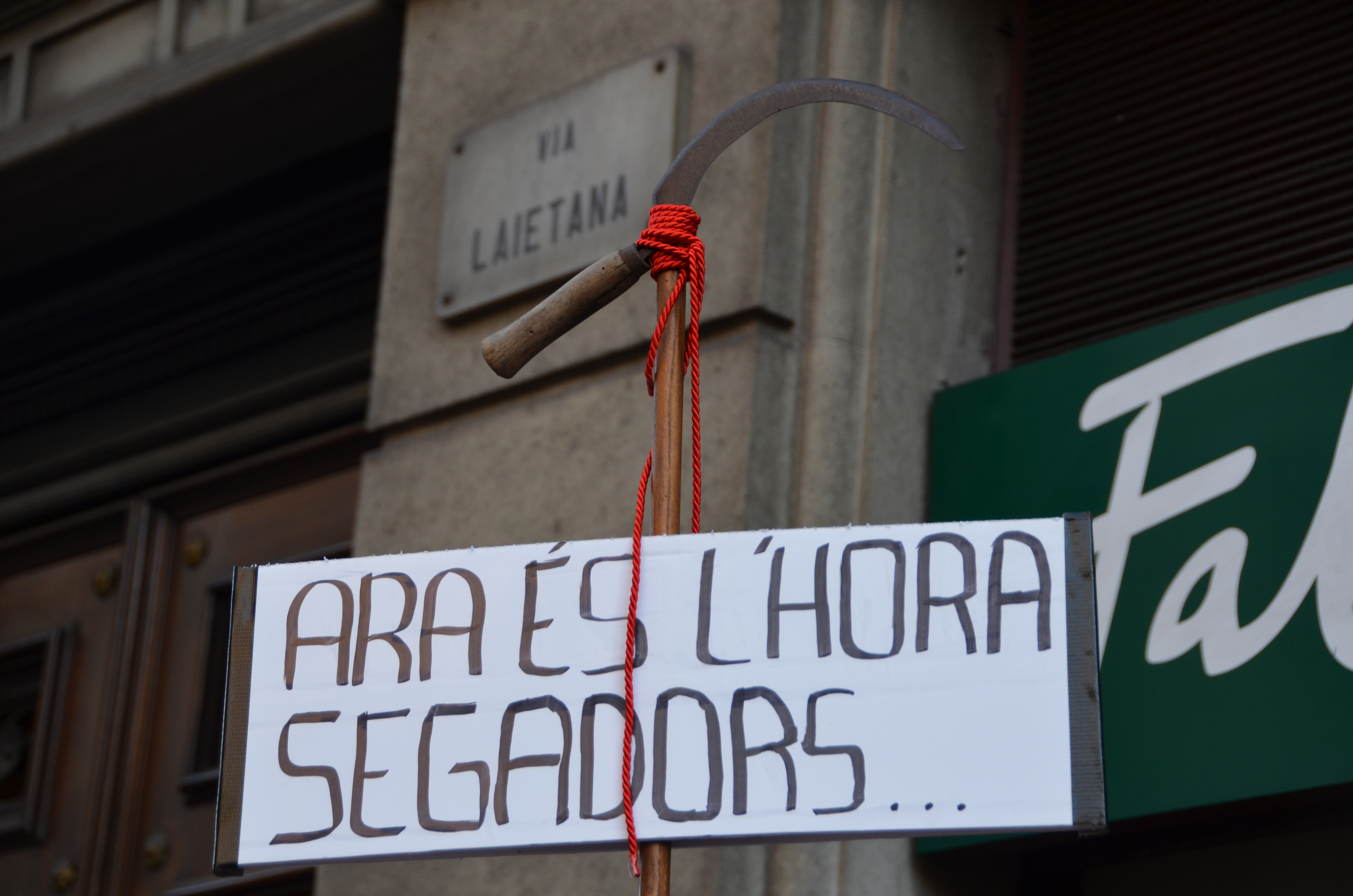 11s2012 Via Laietana - Segadors